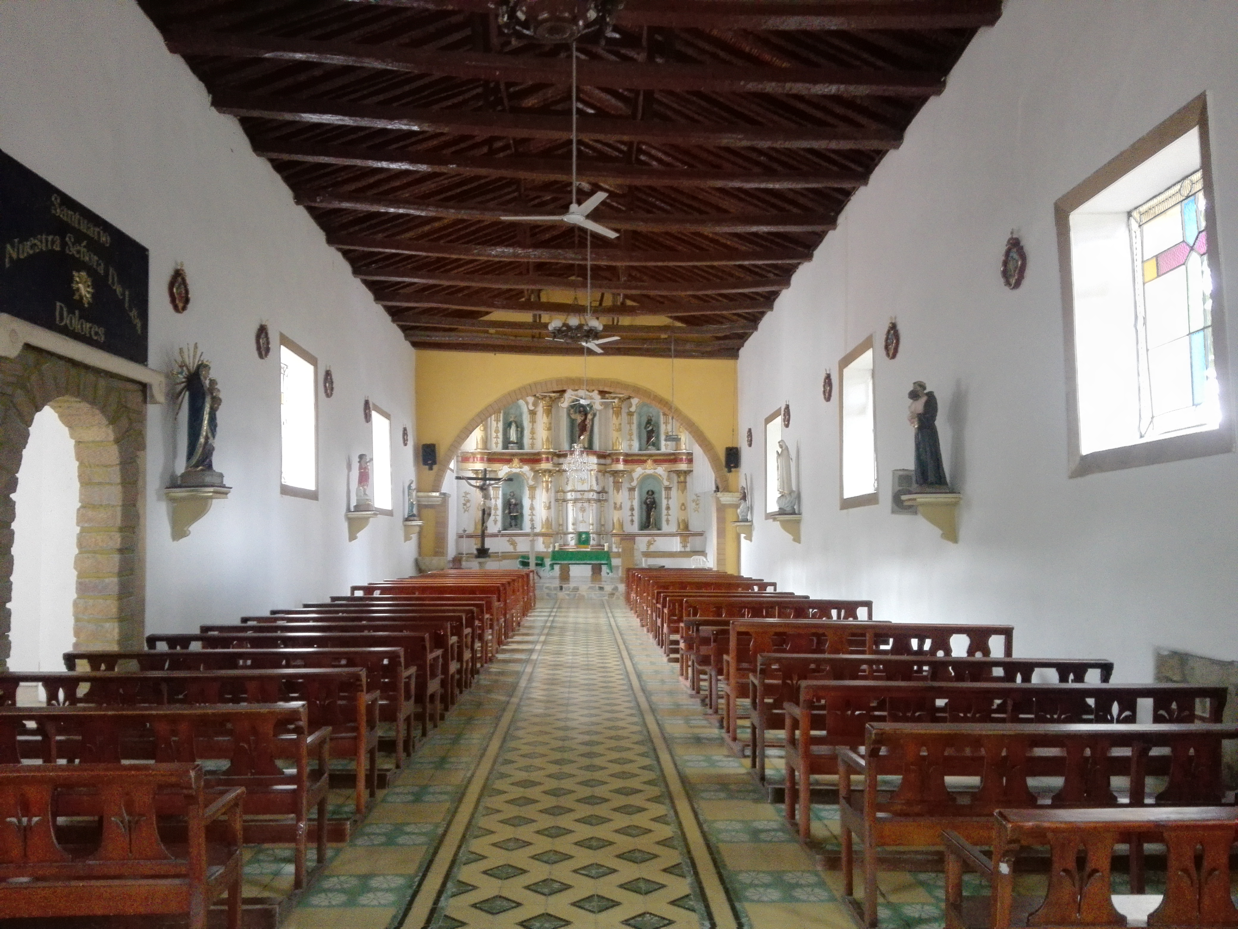 Representa el lema religioso de Palmar, pues, en su mayoría, la población es fervorosamente católica.